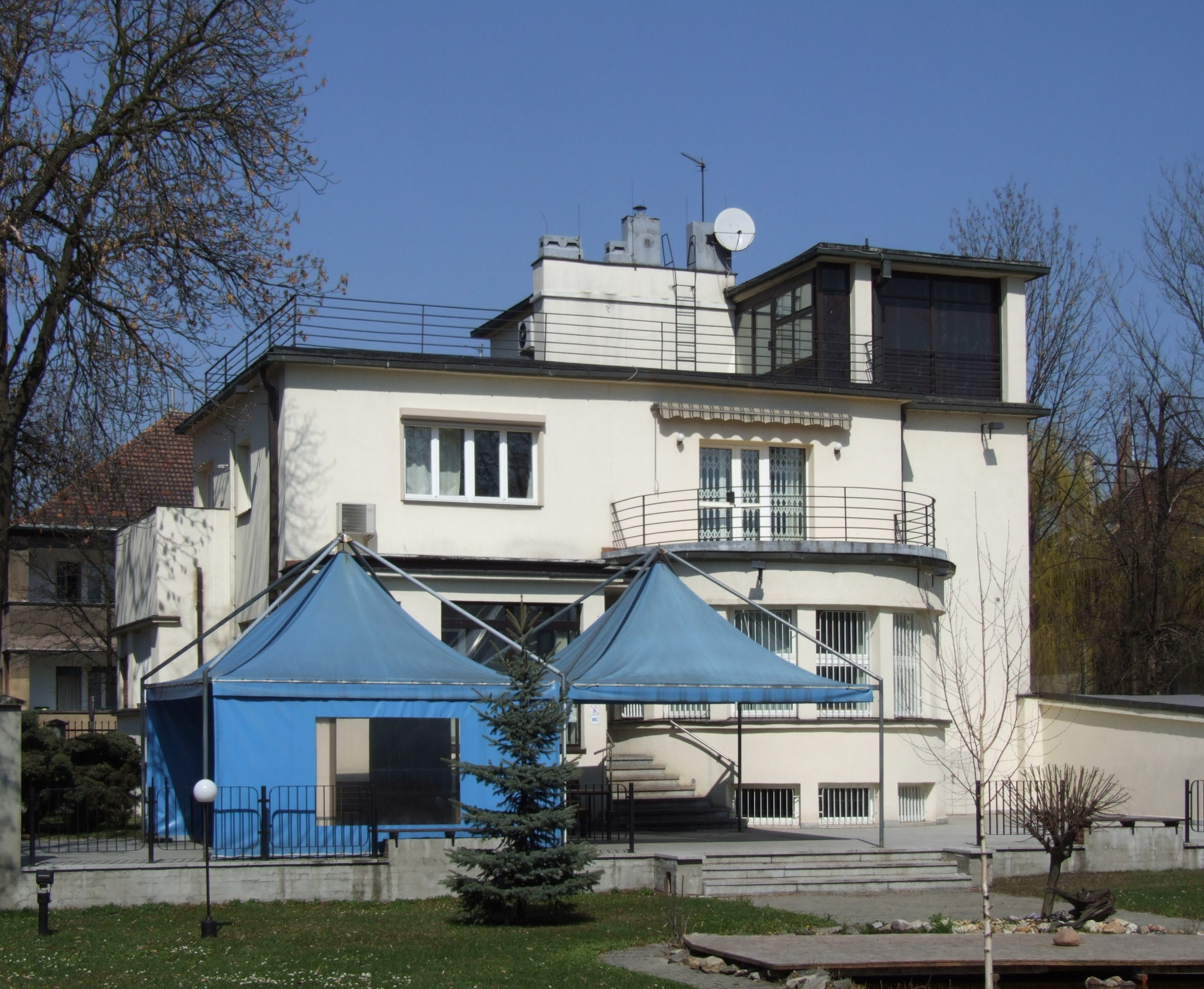 Konsulat Niemiec w Opolu